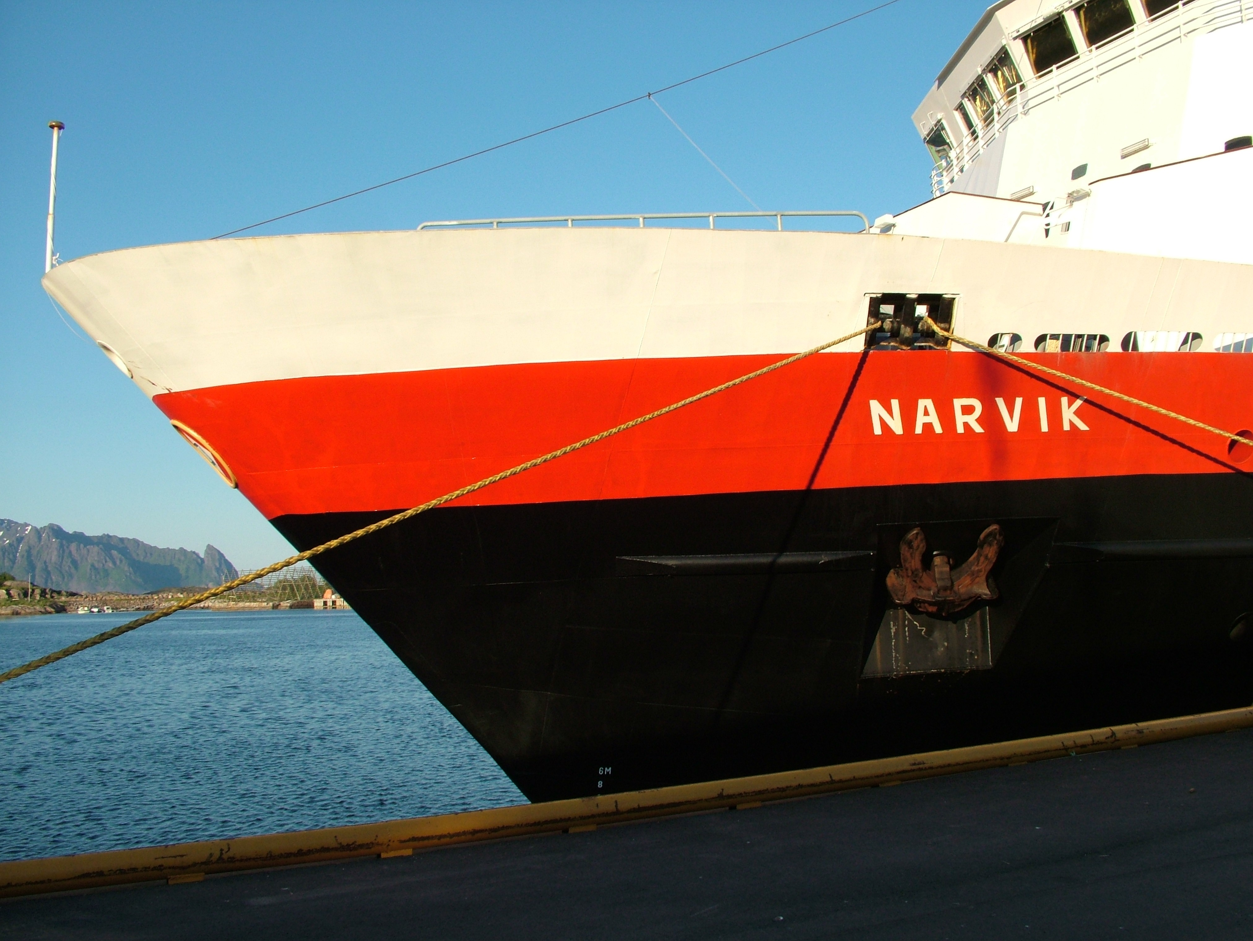 MS Narvik, ein Hurtigruten-Schiff, der Bug, ansicht in Svolvaer